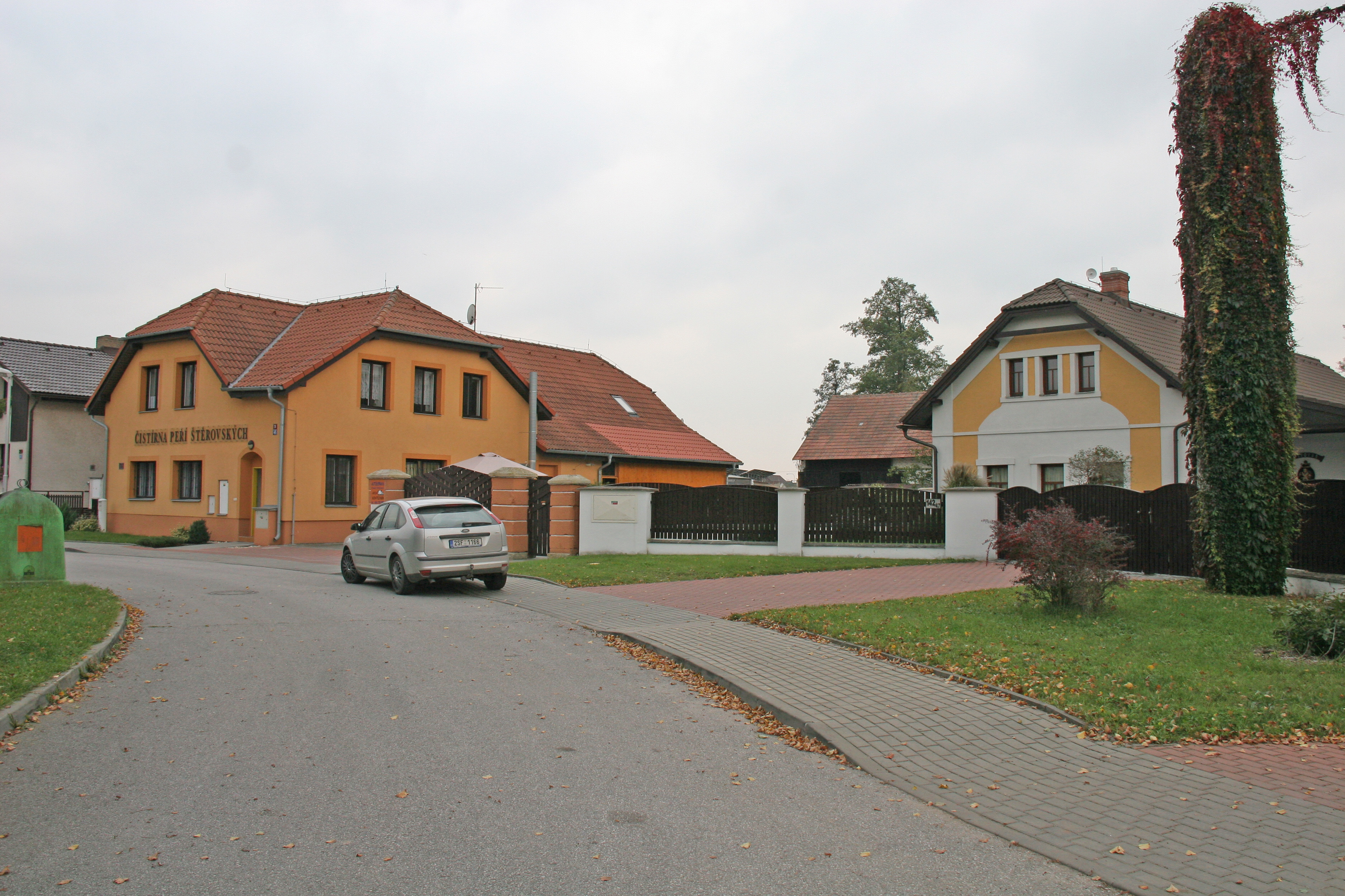 Malšova Lhota čp. 45